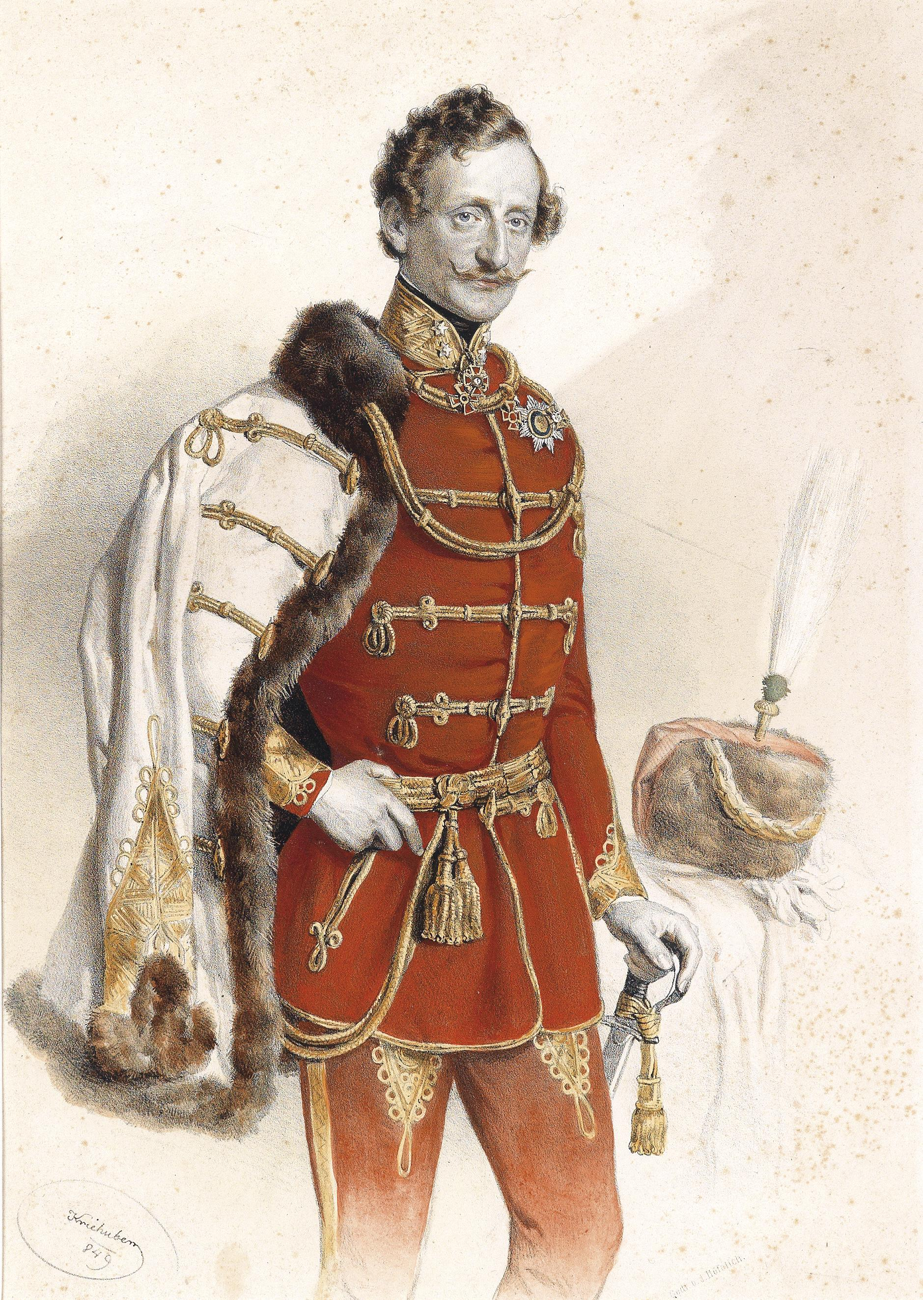 Porträt des Feldmarschalleutnants Franz de Paula Joachim Josef von Liechtenstein (1802–1887) in ungarischer Generals-Gala-Adjustierung (über die rechte Schulter gehängt der weiße, goldverschnürte und pelzverbrämte Generals-Pelzattila), rechts auf einem angedeuteten Tisch der Generals-Kalpak aus braunem Edelmarderfell, scharlachrotem Tuchsack, weißem Reiherfederbusch und goldenem Schnurbehang. Im Stein signiert und datiert 'Kriehuber (1)849'. 35.5 x 25 cm. Auf dem unteren Blattrand aufgeklebtes Etikett mit der Bezeichnung ‚Franz Fürst Liechtenstein, Feldmarschall-Lieutenant‘. (hier nicht zu sehen)